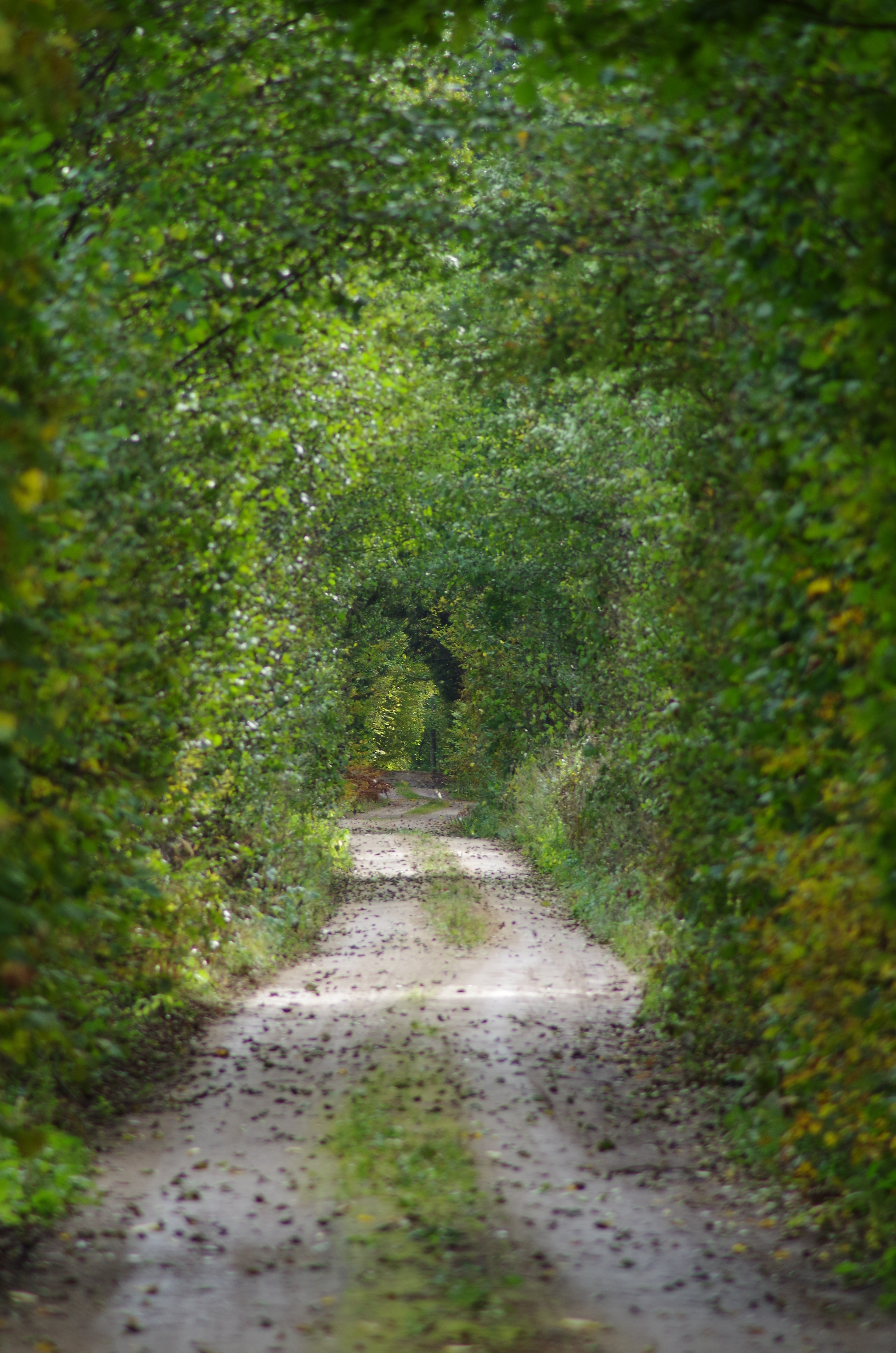 Ten plik został przesłany w ramach konkursu Wakacje z Wikipedią